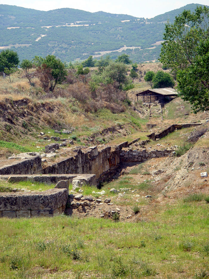 Fortificaciones y puente de Anfípolis Amphipolis fortifications along the Strymon, photograph taken by Marsyas on 02/16/2002.